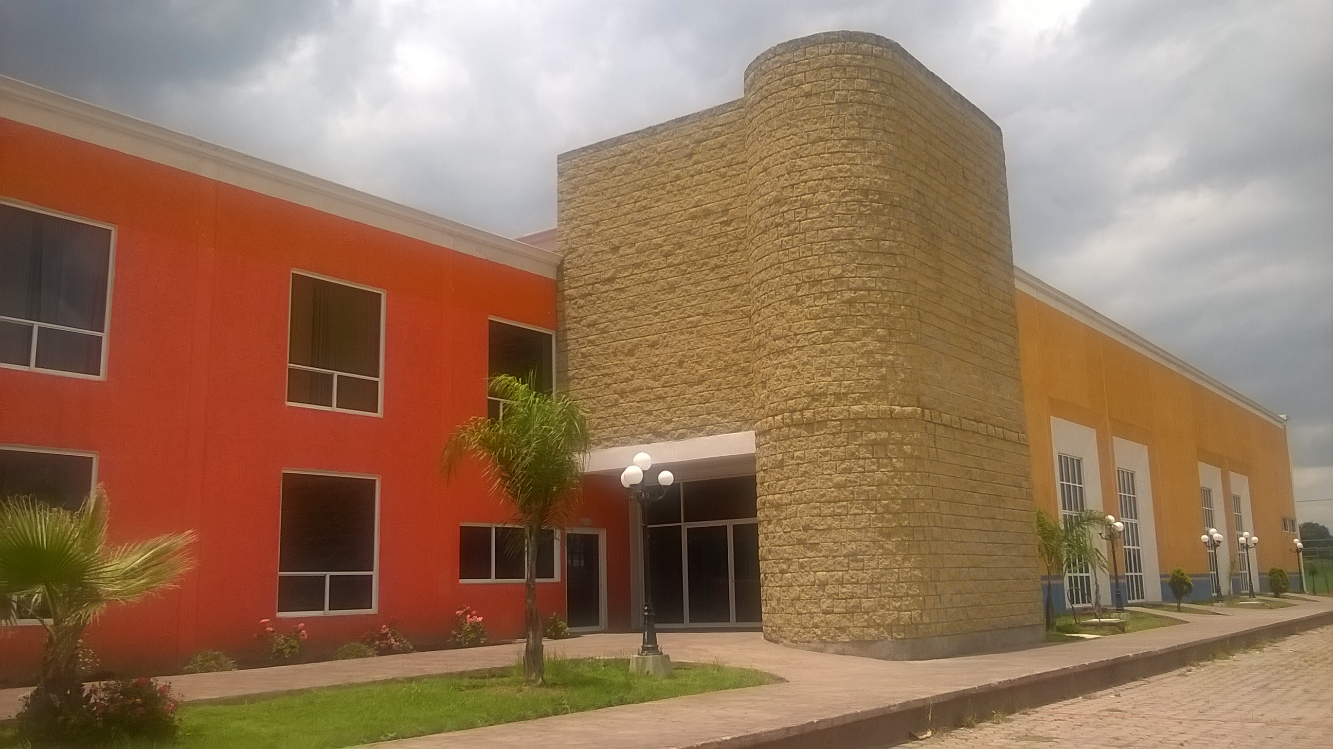 Centro Comunitario Cuaxomulco, Tlaxcala